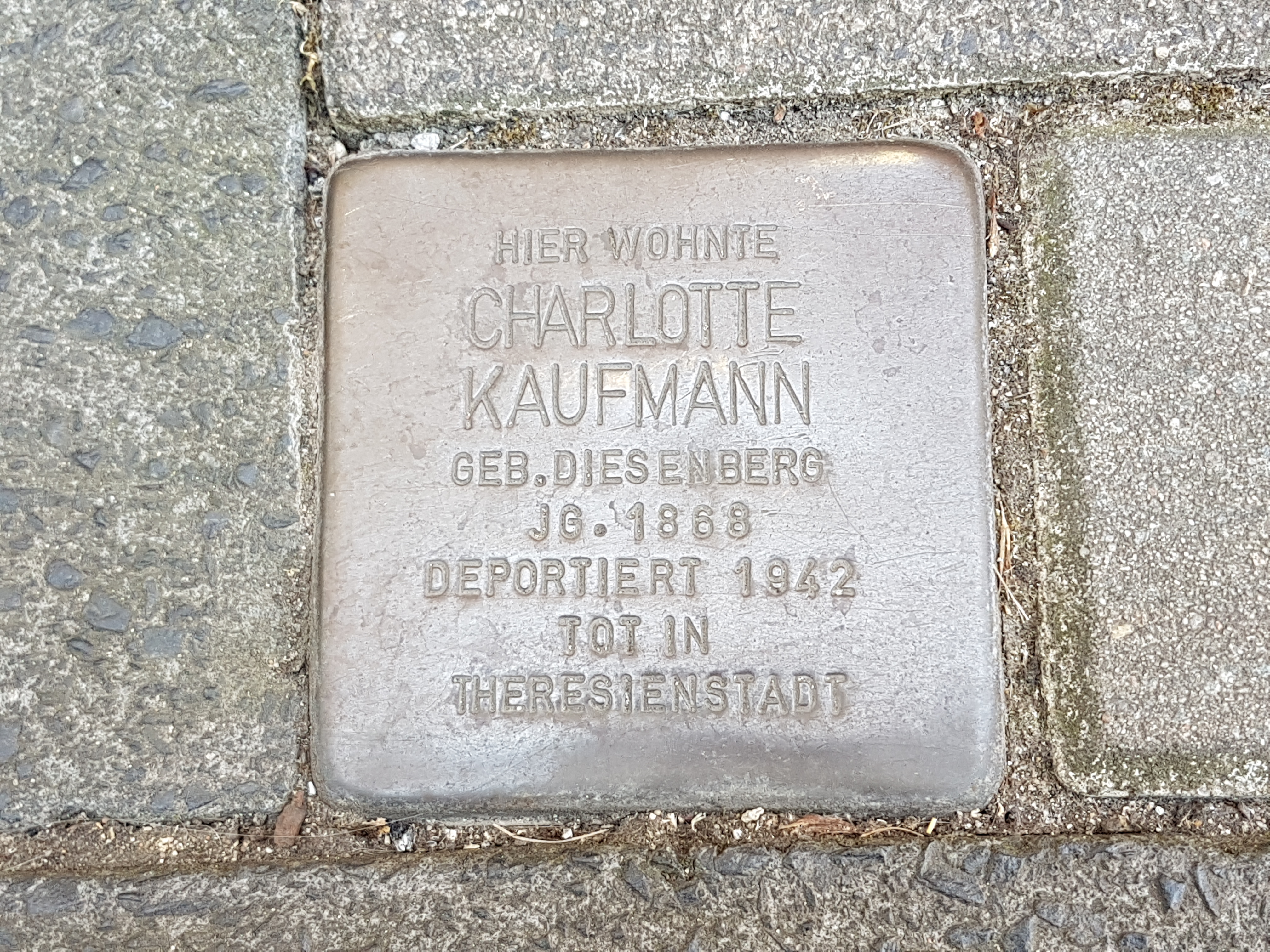 Stolperstein Duisburg